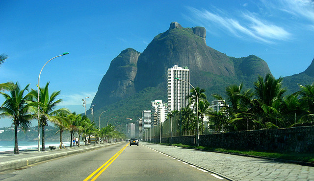 Av. Pref. Mendes de Morais, São Conrado, Rio de Janeiro, RJ, Brasil: ao fundo a Pedra da Gávea.